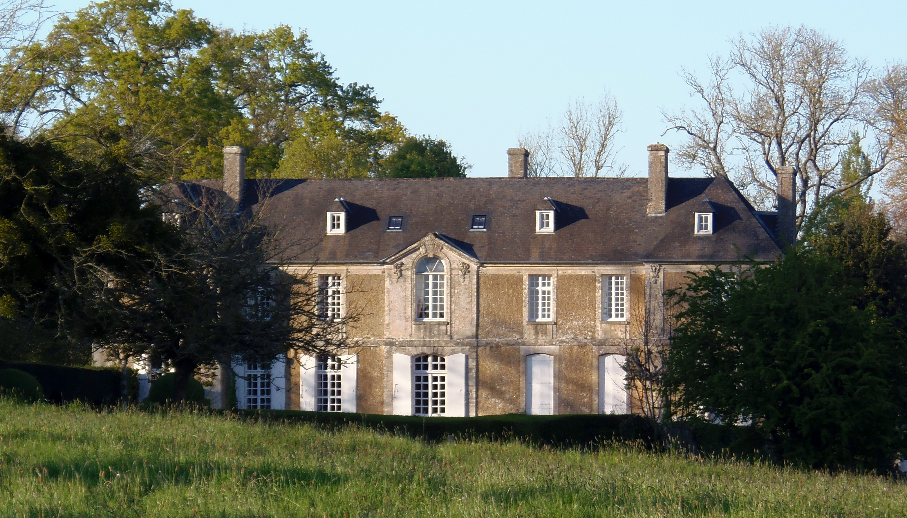 Barbeville (Normandie, France). Le château.